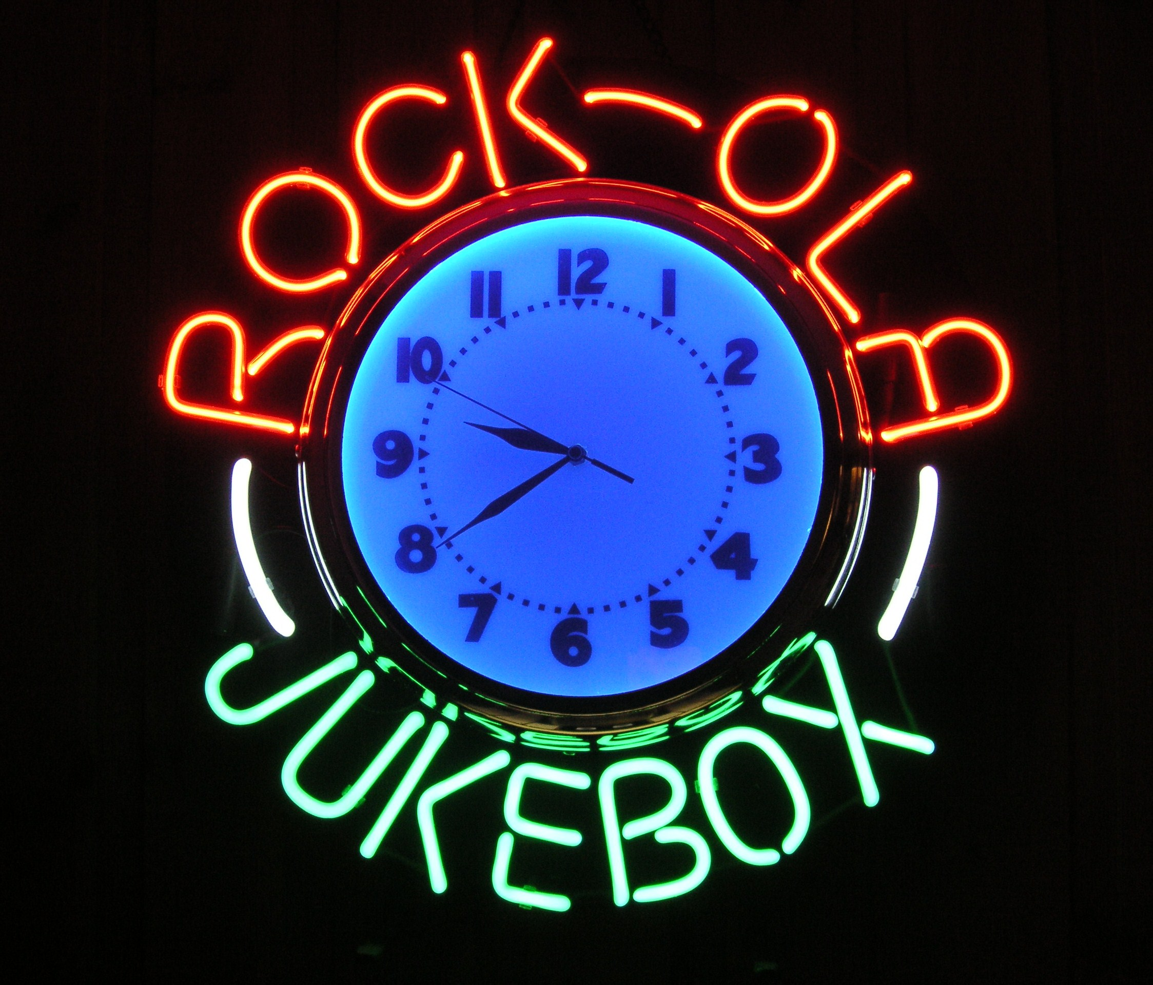 Neonskylt och klocka för Rock-Ola Jukebox